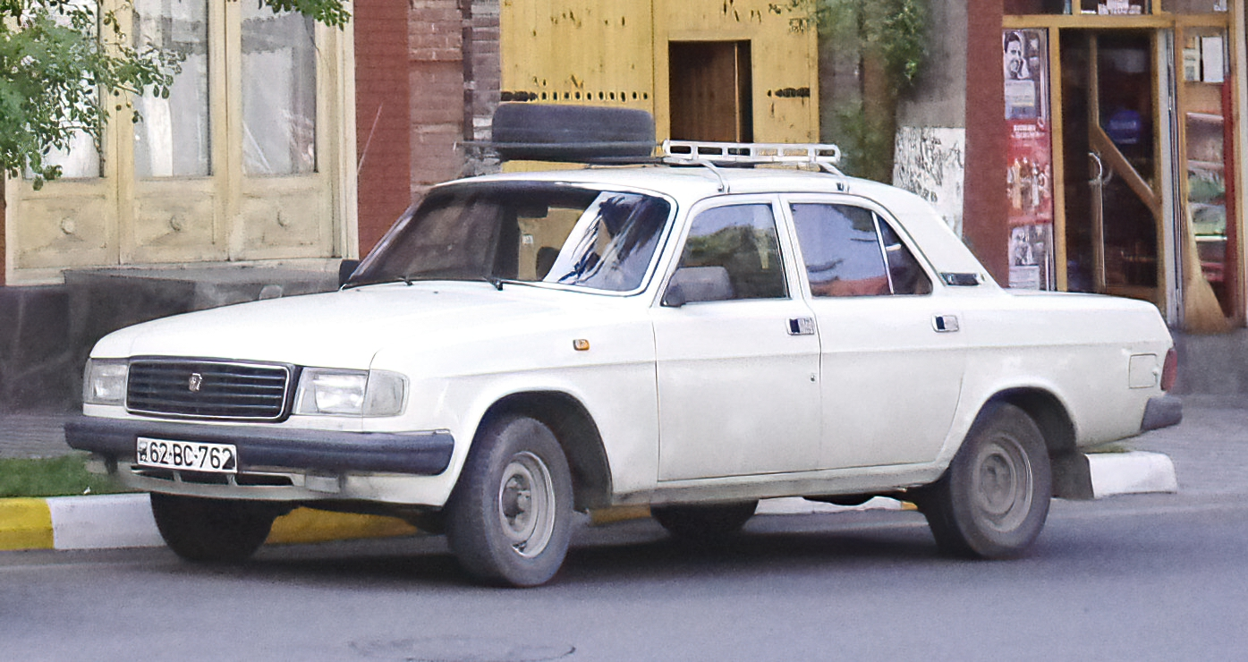 GAZ-31029